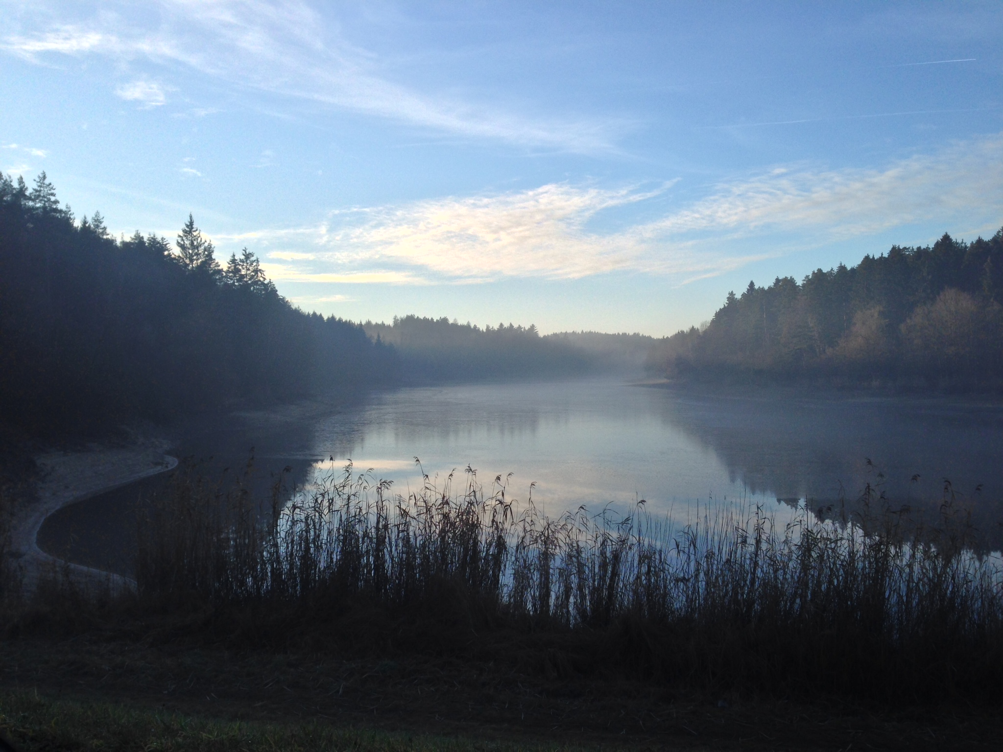 (LSG:BW-1.36.019)_Speicherbecken Orrot